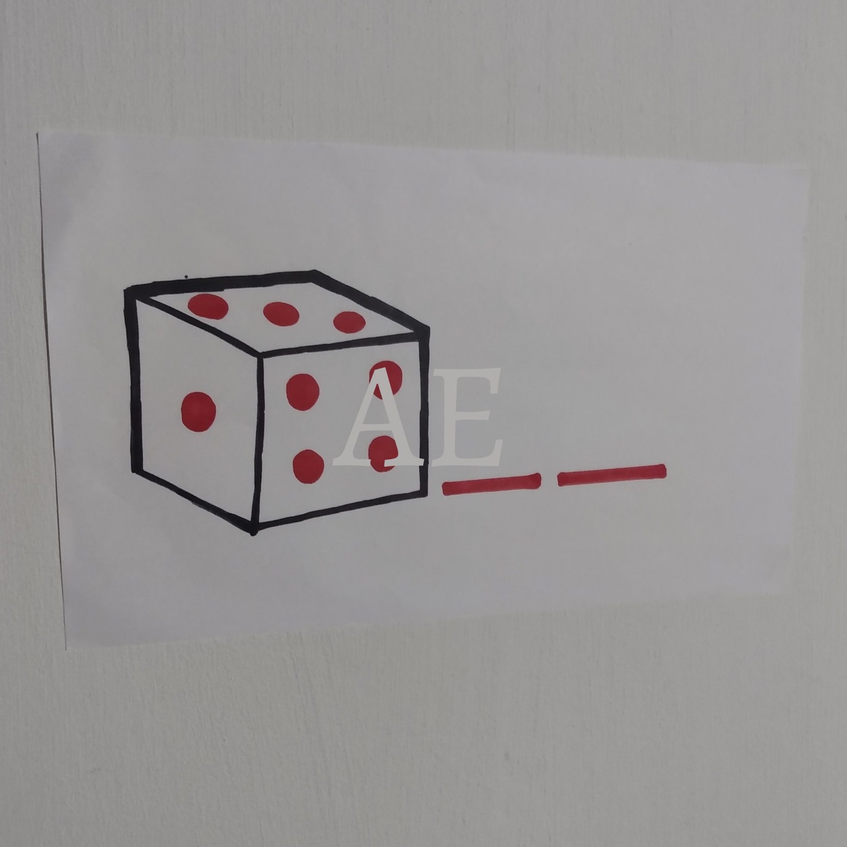 "La orquesta"